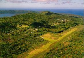 Village de 'Esia et piste d'aterrissage, Niuafo'ou.